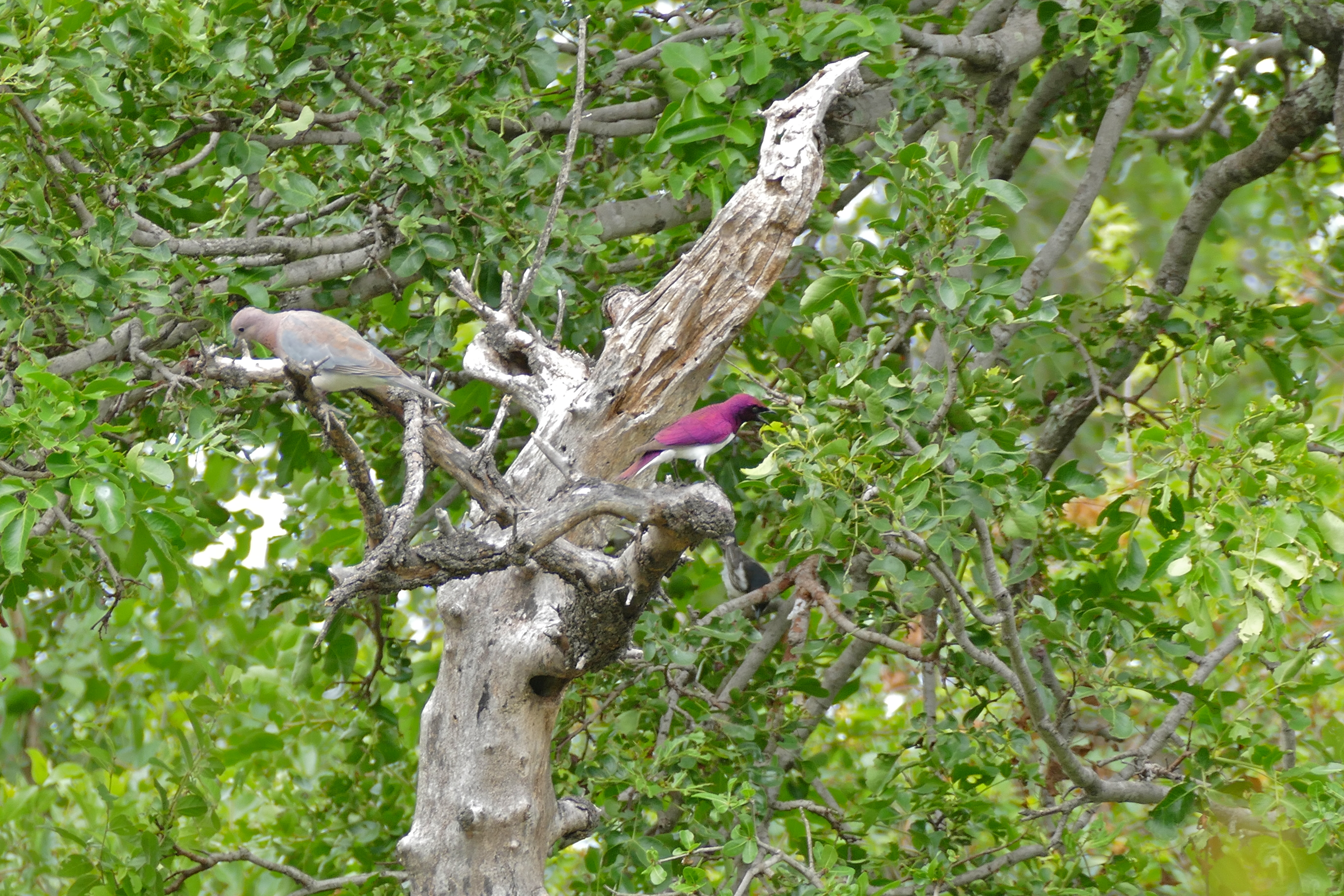 S23 Road West of Biyamiti, Kruger NP, SOUTH AFRICA